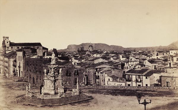 Vue générale de Palerme. Par Gustave Le Gray, probablement en juin 1860.